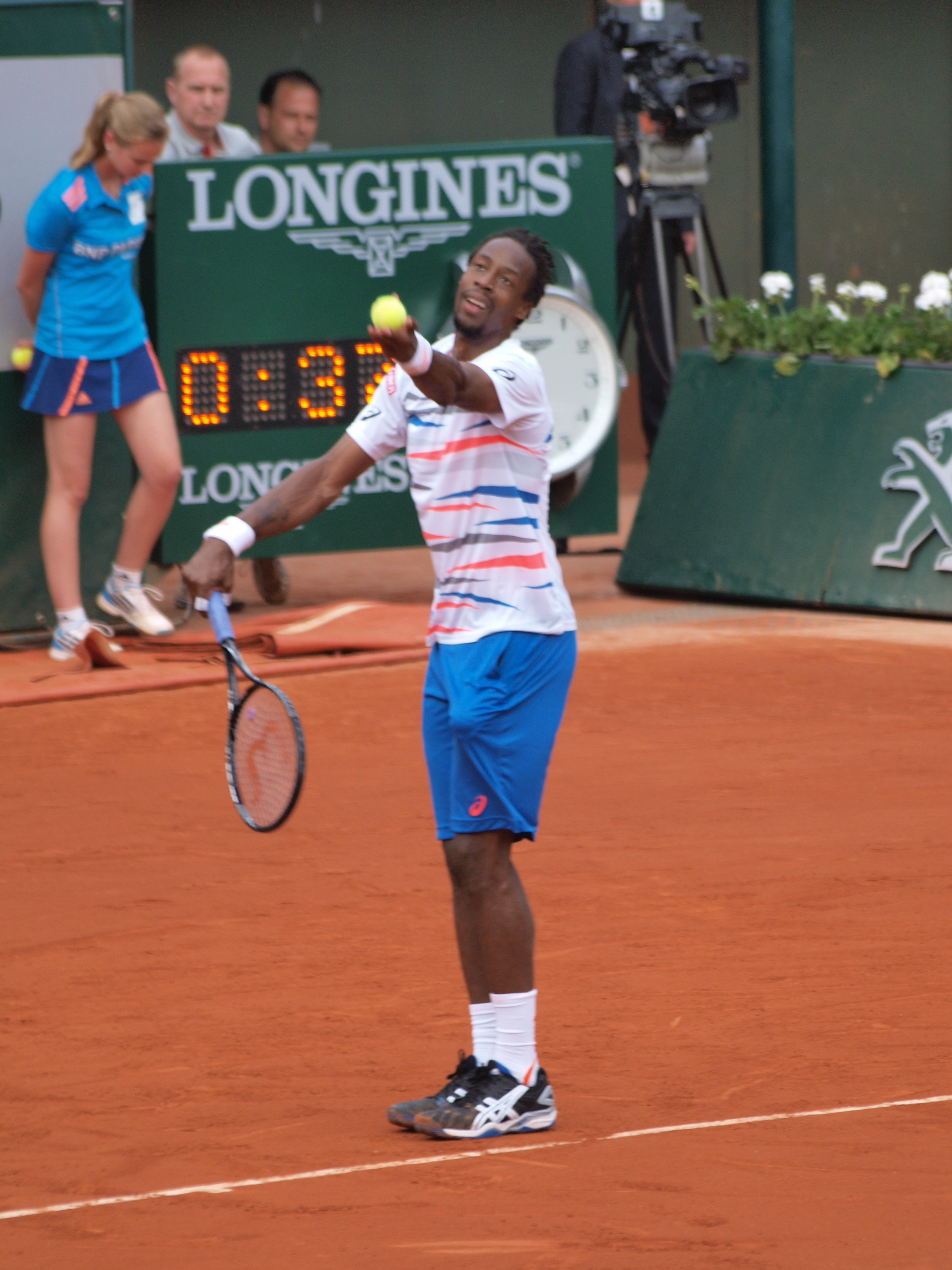 Internationaux de France de tennis, le 2 juin 2014, sur le court Philippe Chatrier : Gaël Monfils